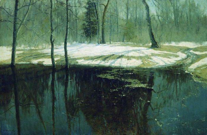 Беларуская (тарашкевіца): «Вясновая вада»